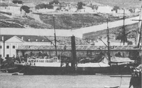 Товаро-пассажирский пароход «Эльборуc»